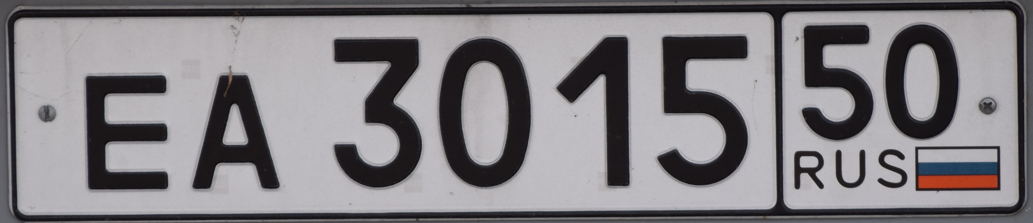 Russische kentekenplaat voor trailers